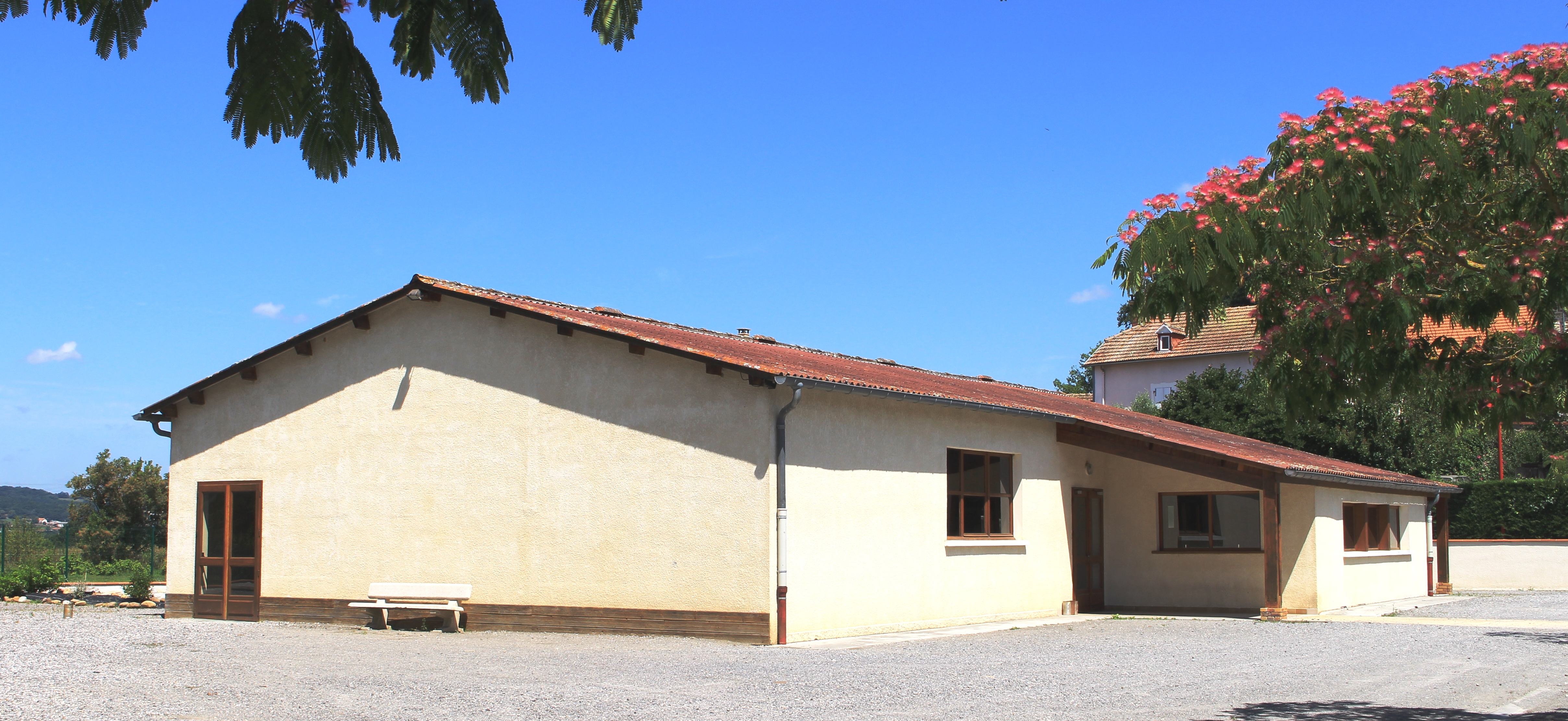 Salle des fêtes de Peyraube (Hautes-Pyrénées)